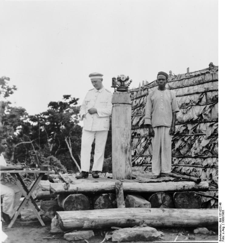 Kamerun, Grenzvermessung der Süd- und Südostgrenze von Kamerun gegen das französische Kongogebiet (1900-1903), Oberltn. Frank mit schwarzem Meßgehilfen am Universalinstrument. (Meridianlager am Dscha)